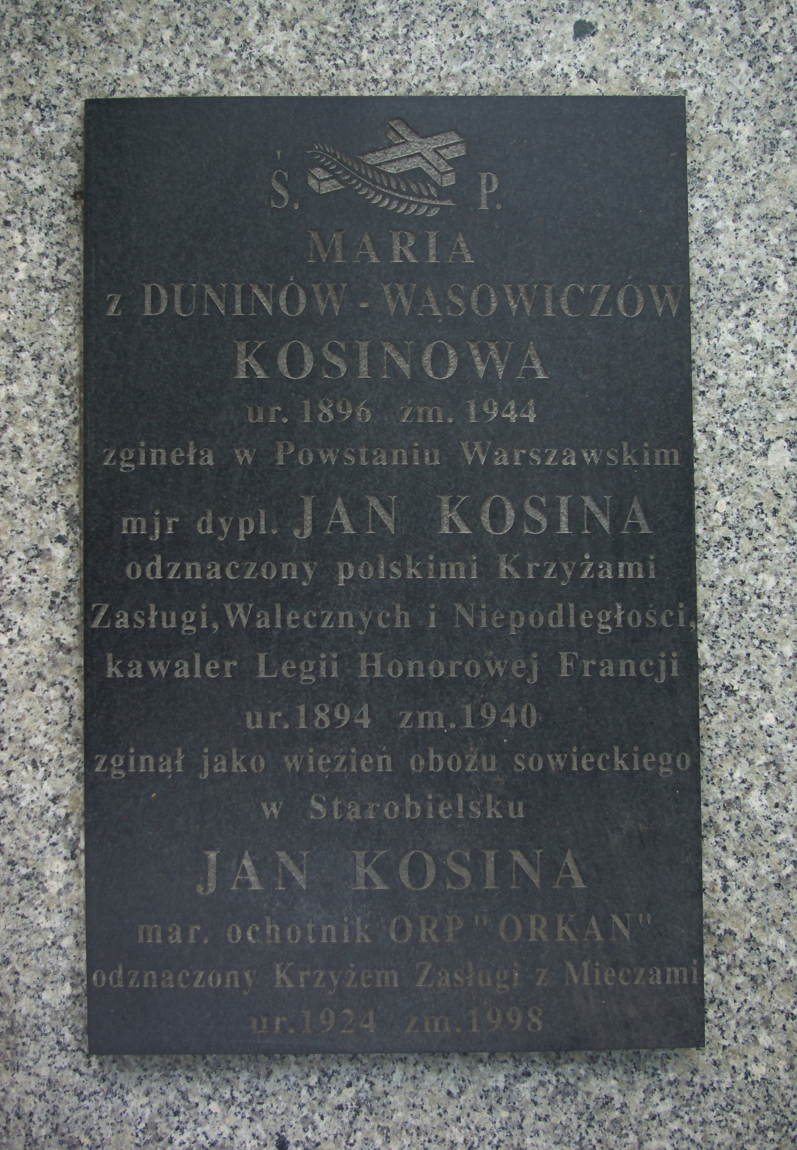 Grób Piotr Dunina-Wąsowicza na Cmentarzu Centralnym w Sanoku. Symboliczne upamiętnieni zostali: Jan Kosina (1894-1940), Maria Kosina, z domu Dunin-Wąsowicz (1896-1944) oraz ich syn Jan Kosina (1924-1998).